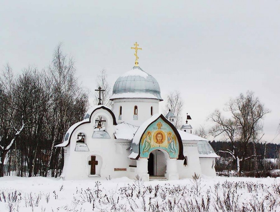 Фото_Храма_Рождества_Богородицы_в_Надовражино